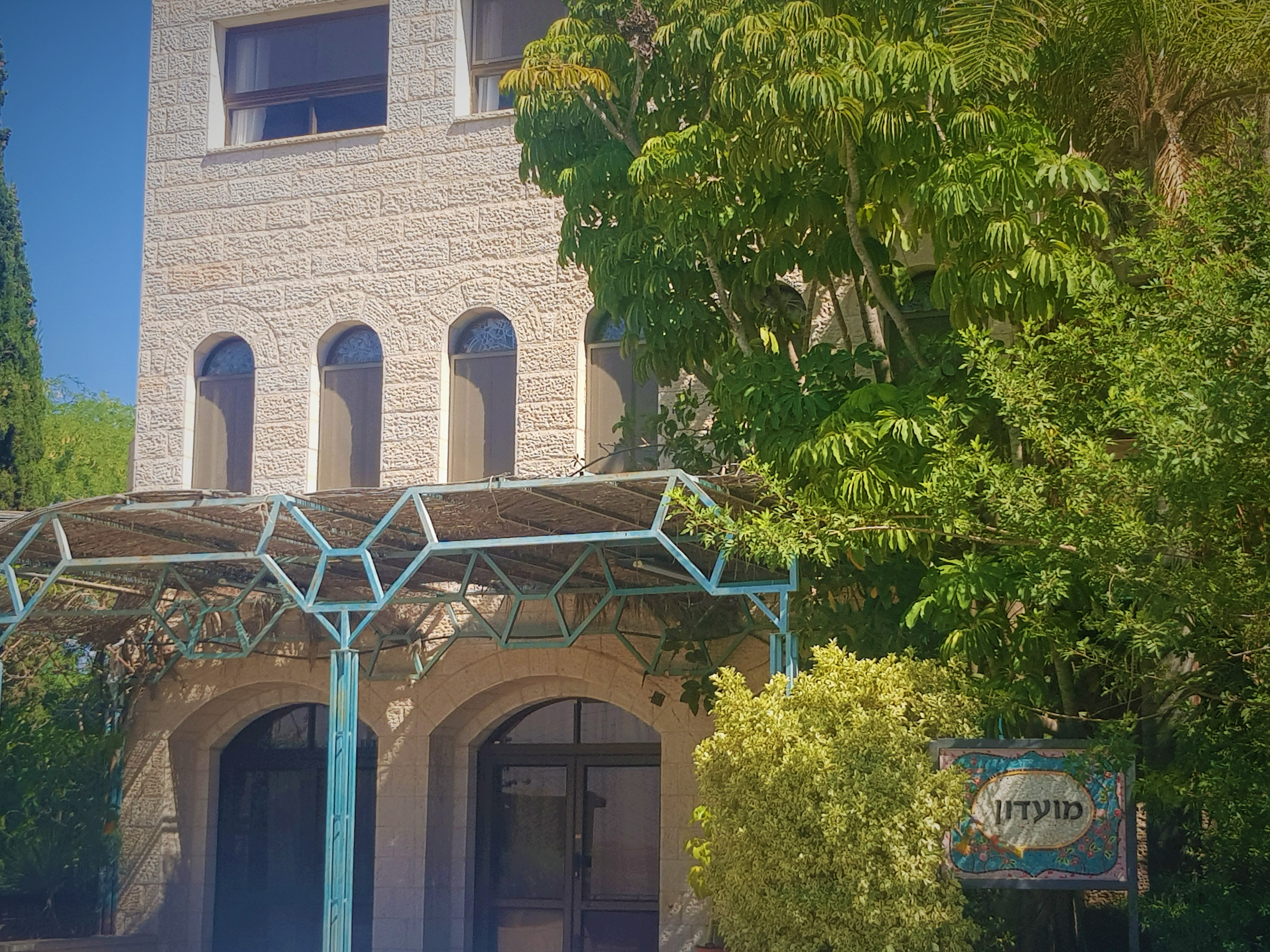 מועדון היישוב - כניסה למועדון כפר אדומים